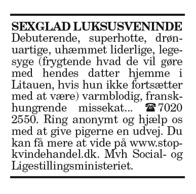 Annoncekampagne mod kvindehandel